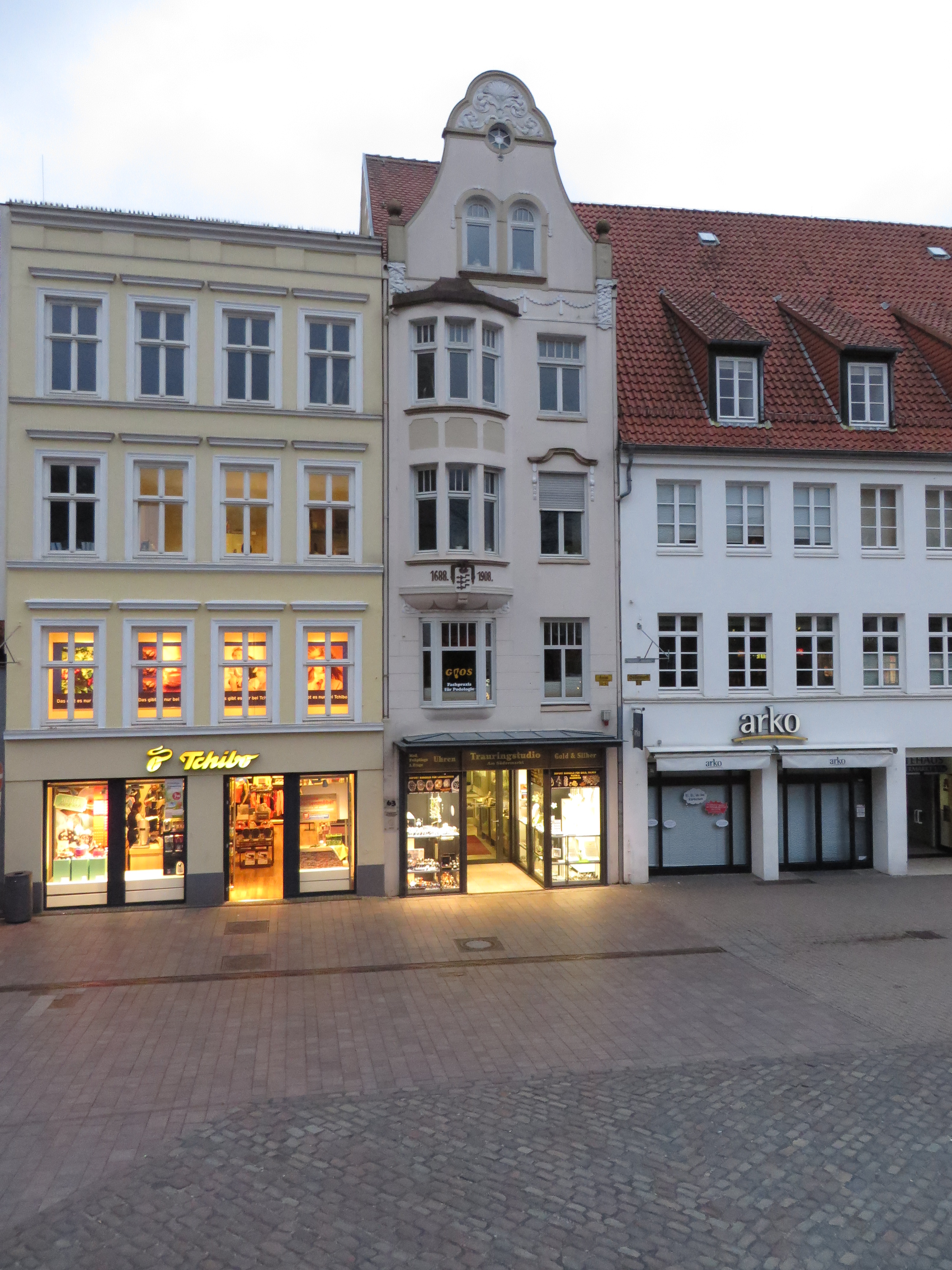 Flensburgs Holm 63 (Gebäude von Katsund bzw Kattsund) mit dem Wappen der Reepschlägerfamilie Landt, Bild 001